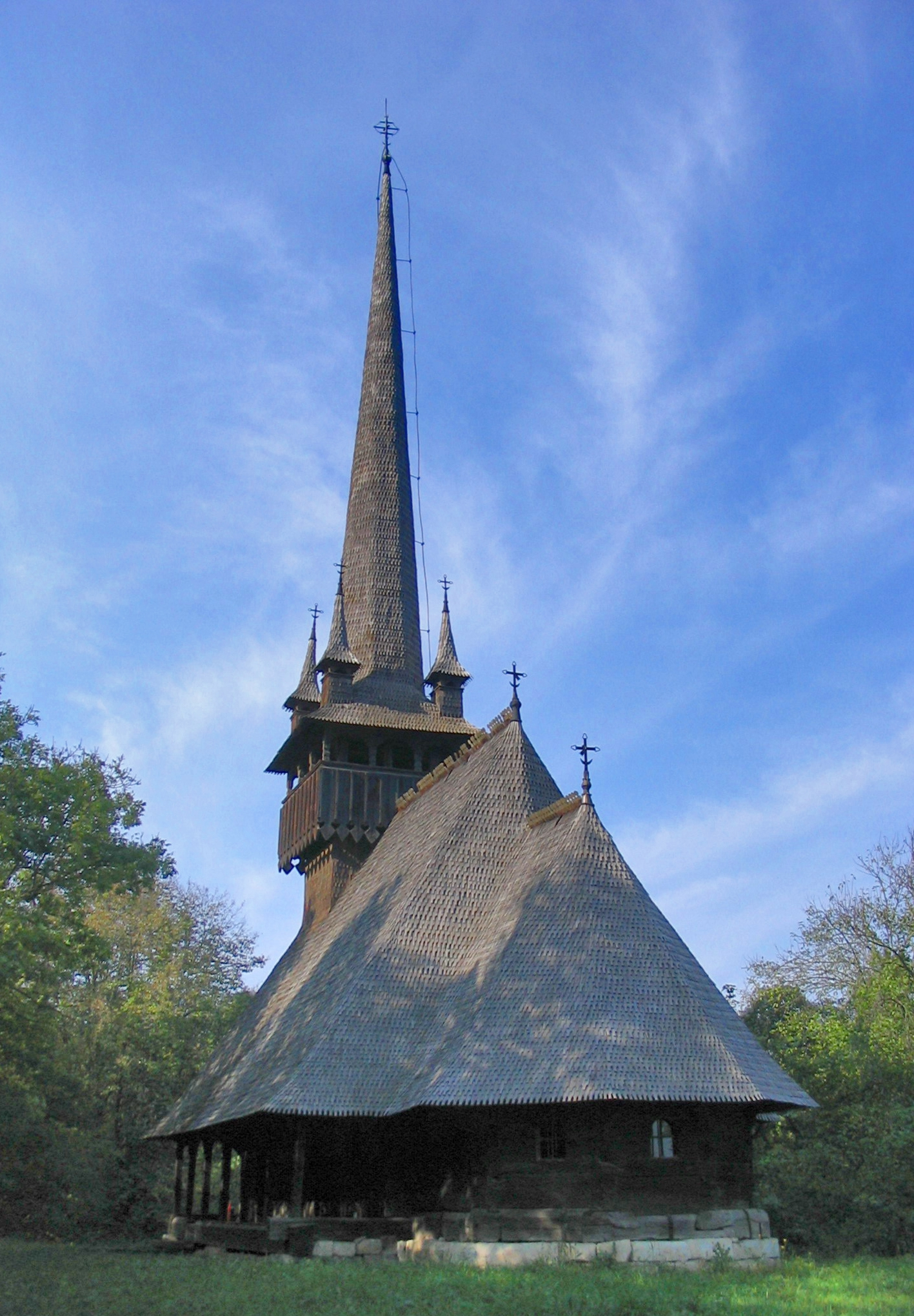 Biserica de lemn din Petrindu, judeţul Sălaj. Autor: Bogdan Ilieş Data: octombrie 2005